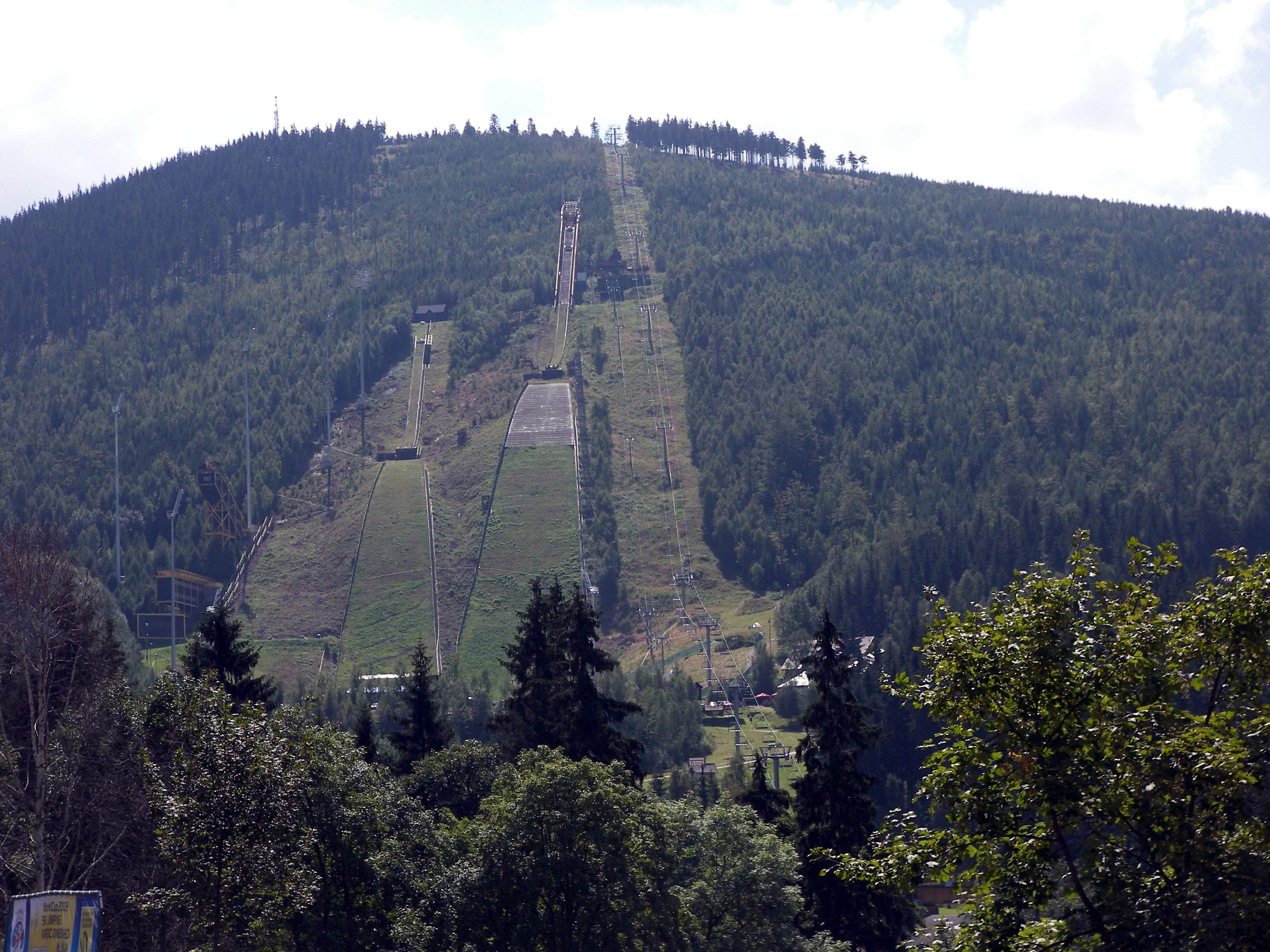 skocznie w harrachovie